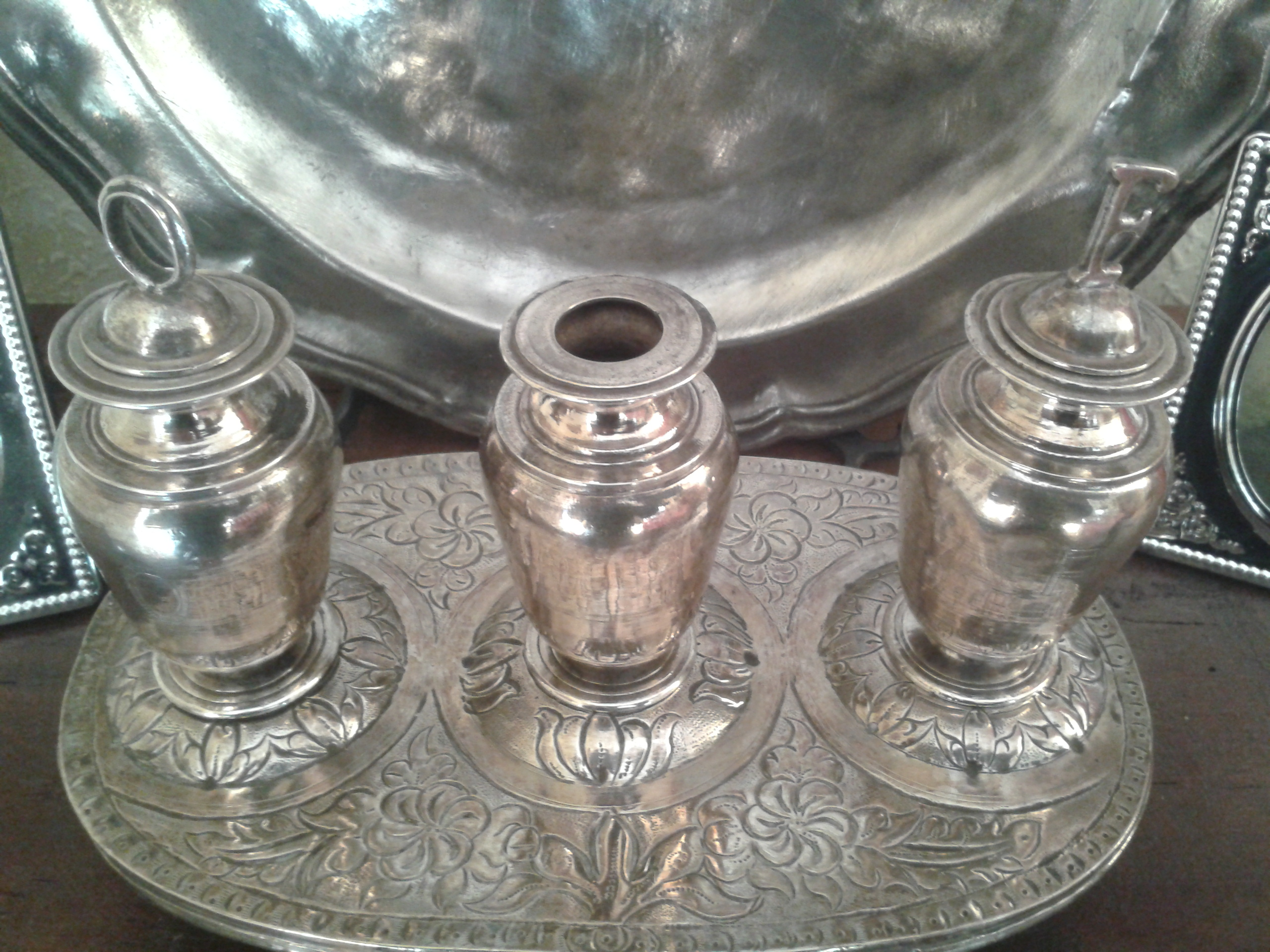 Bandeja y utensilios para administrar la Extremaunción. Plata del S XVIII de las Platerías de Martínez.